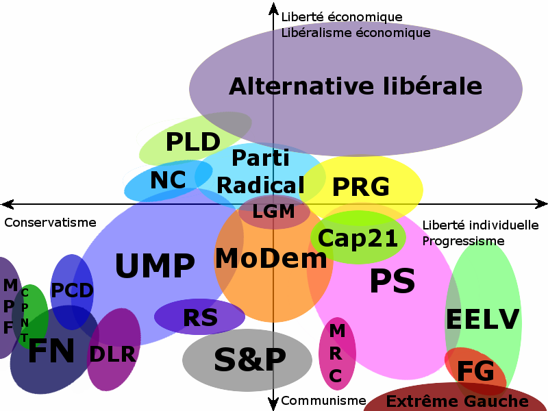 Spectre politique français selon le diagramme de Nolan